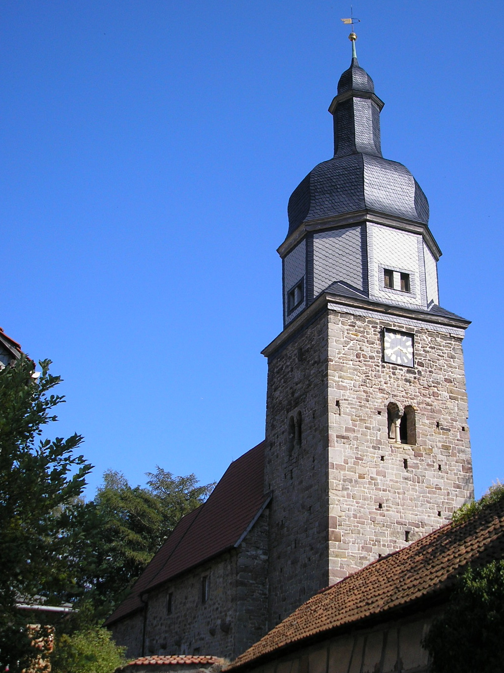 Die Dorfkirche von Reinsfeld bei Ilmenau (Thüringen, Deutschland).